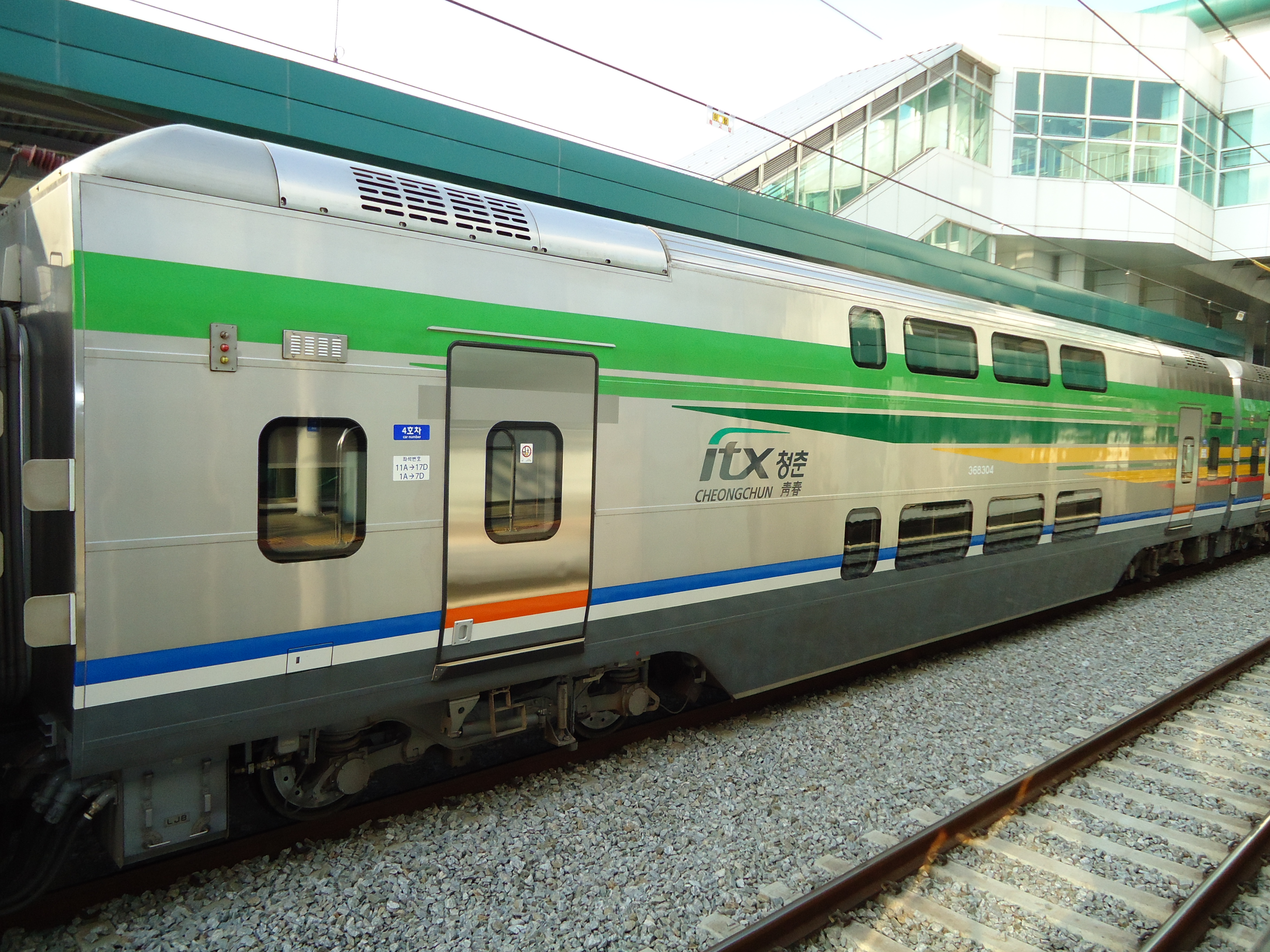 ITX-청춘 2층 차량